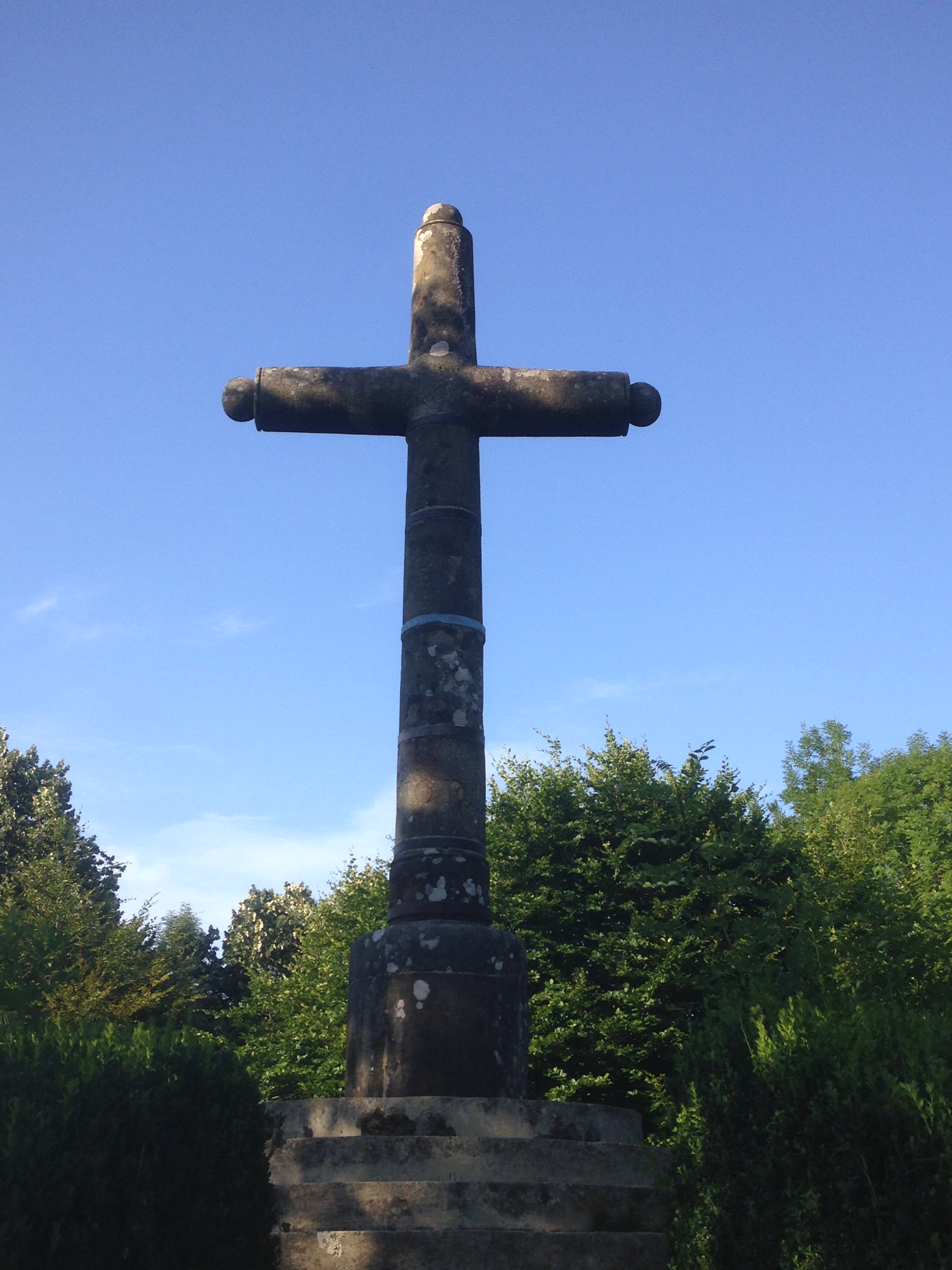 Cruz ubicada en la punta de Arrate en la localidad guipuzcoana de Eibar, en el País Vasco (España)